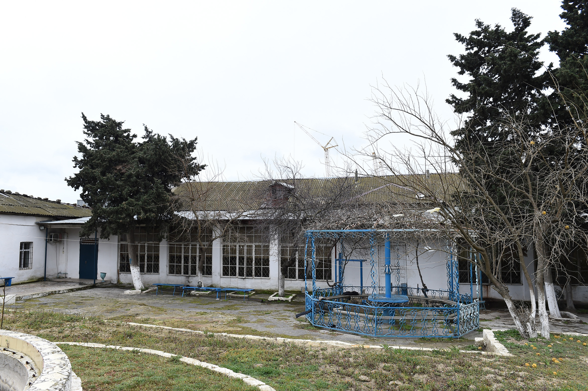 İlham Əliyev yanğın baş verən Respublika Narkoloji Mərkəzinə gələrək vəziyyətlə tanış olub